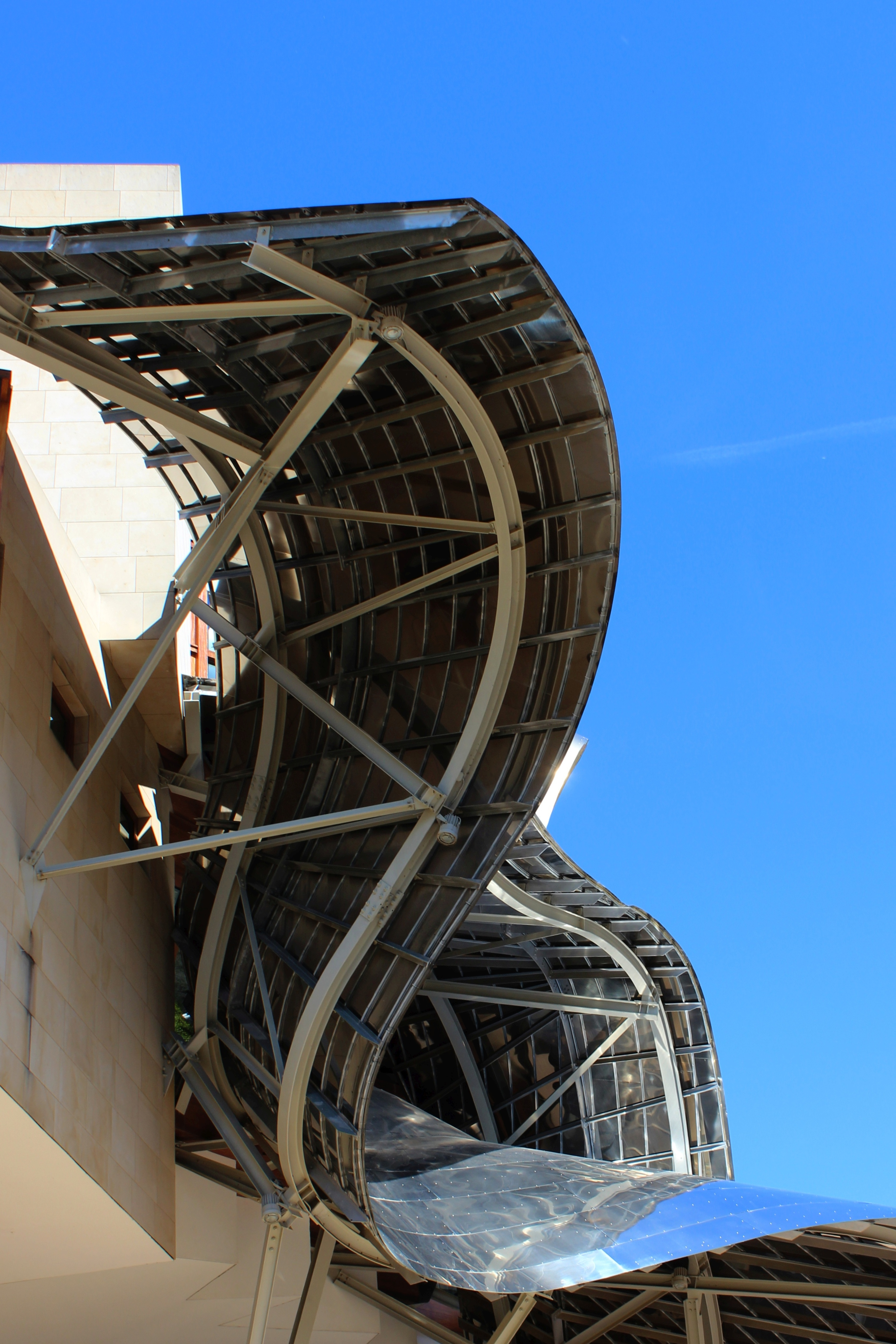 Elciego, Bodegas Marqués de Riscal: Detail der Dachkonstruktion des von Frank Gehry entworfenen Hotels Marqués de Riscal